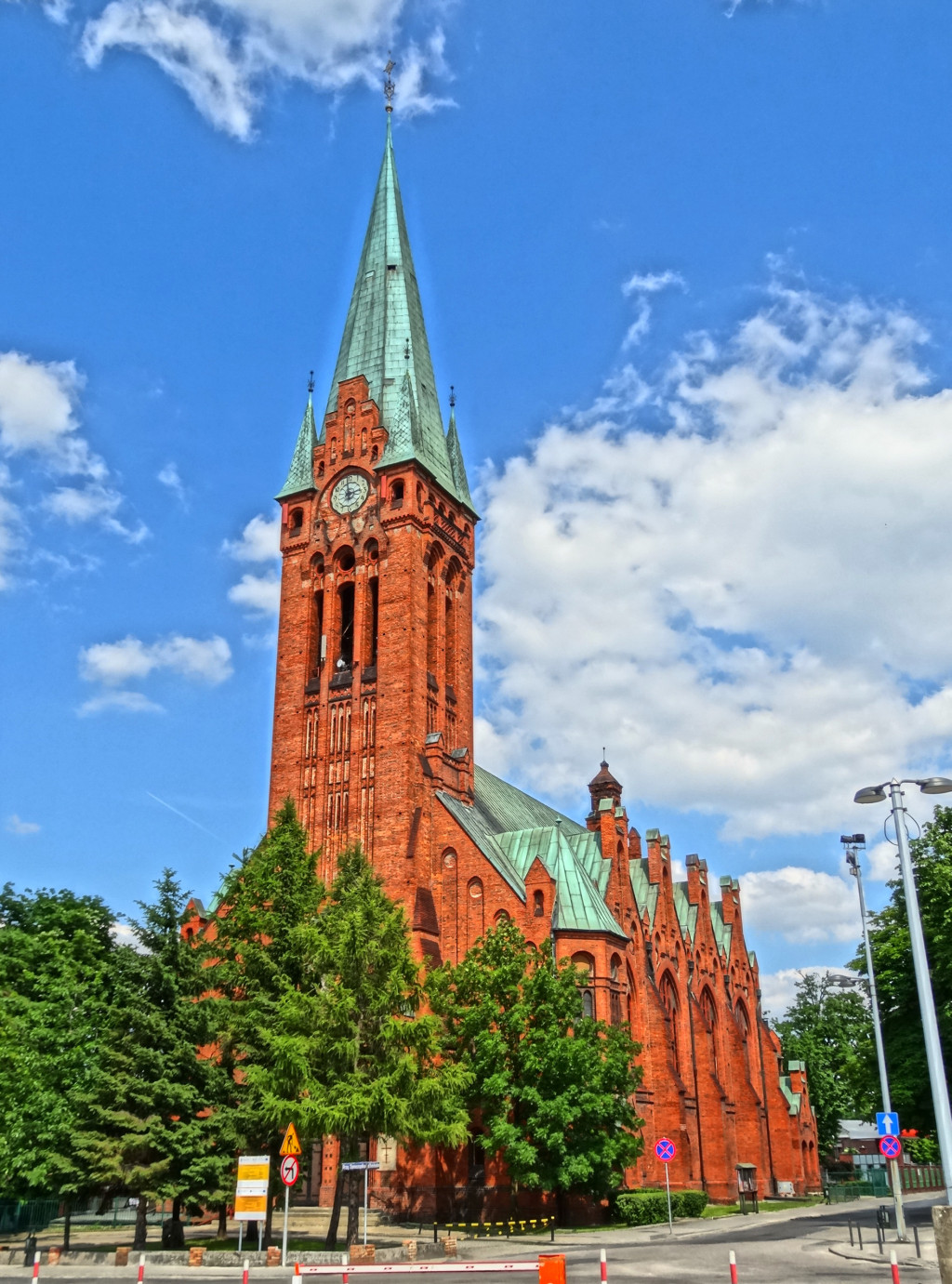 Kościół św. Andrzeja Boboli (Jezuicki) w Bydgoszczy, zbud. 1903 r., do 1945 r. fara ewangelicka